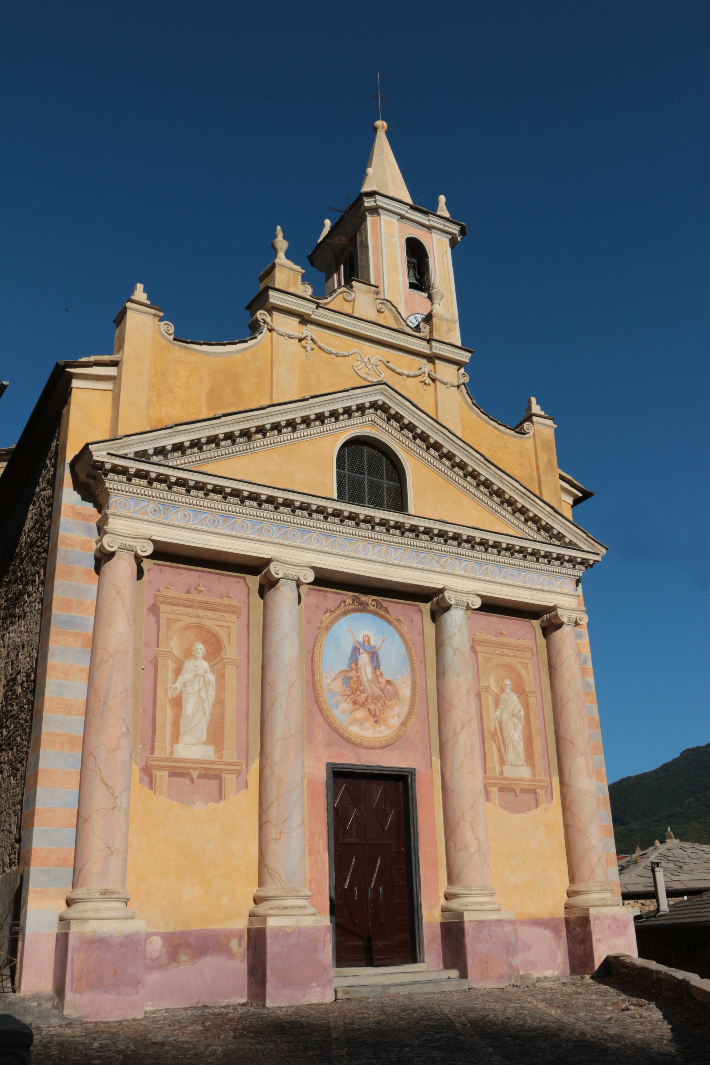 Cenova: Chiesa Parrocchiale dell'Assunta; Facciata principale